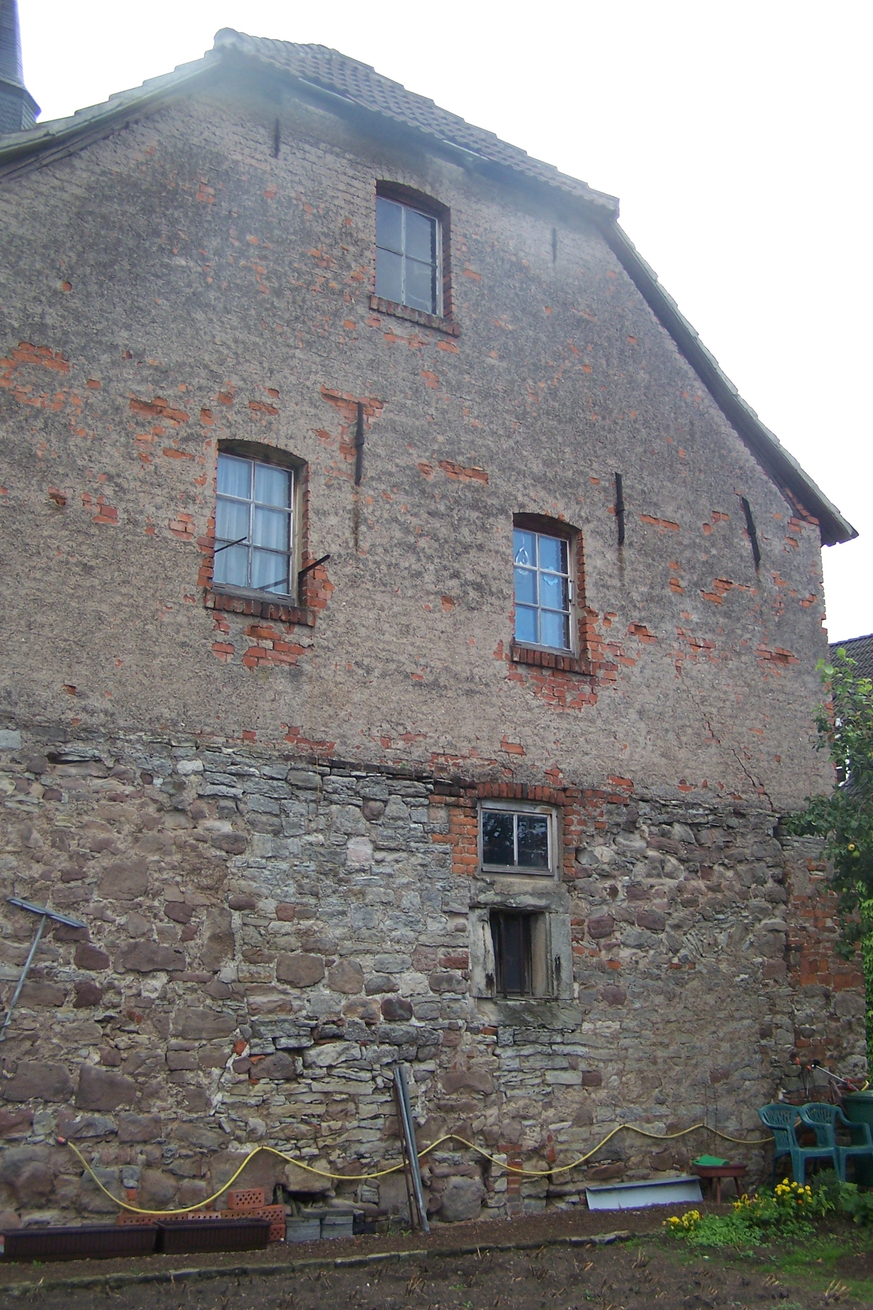 GTH Mechterstädt, Kemenate, Westfassade